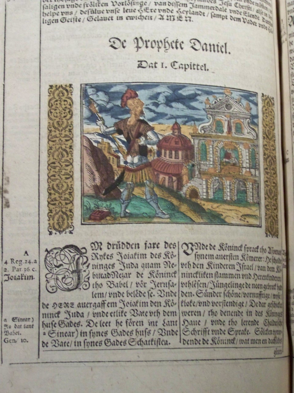 Detail der Barther Bibel im Bibelzenrum St. Jürgen in Barth, Vorpommern.